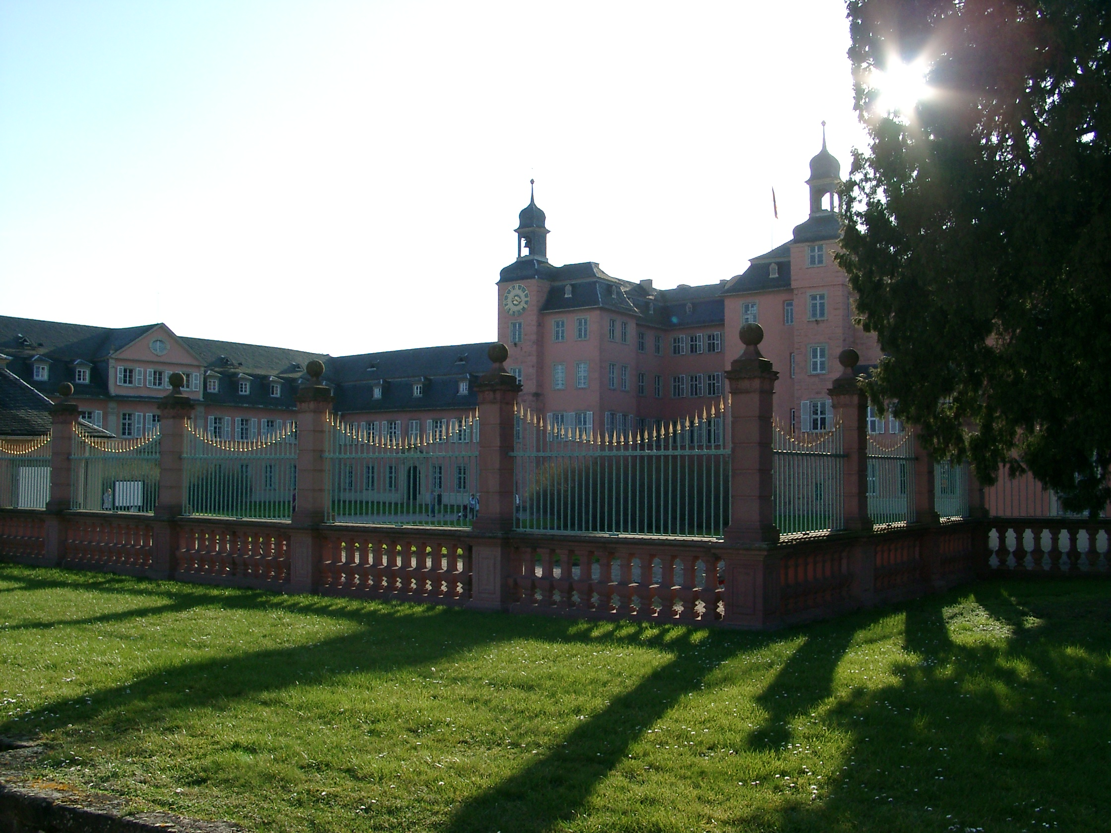 Schwetzingen, Schwetzinger Schloss, Stadtseite